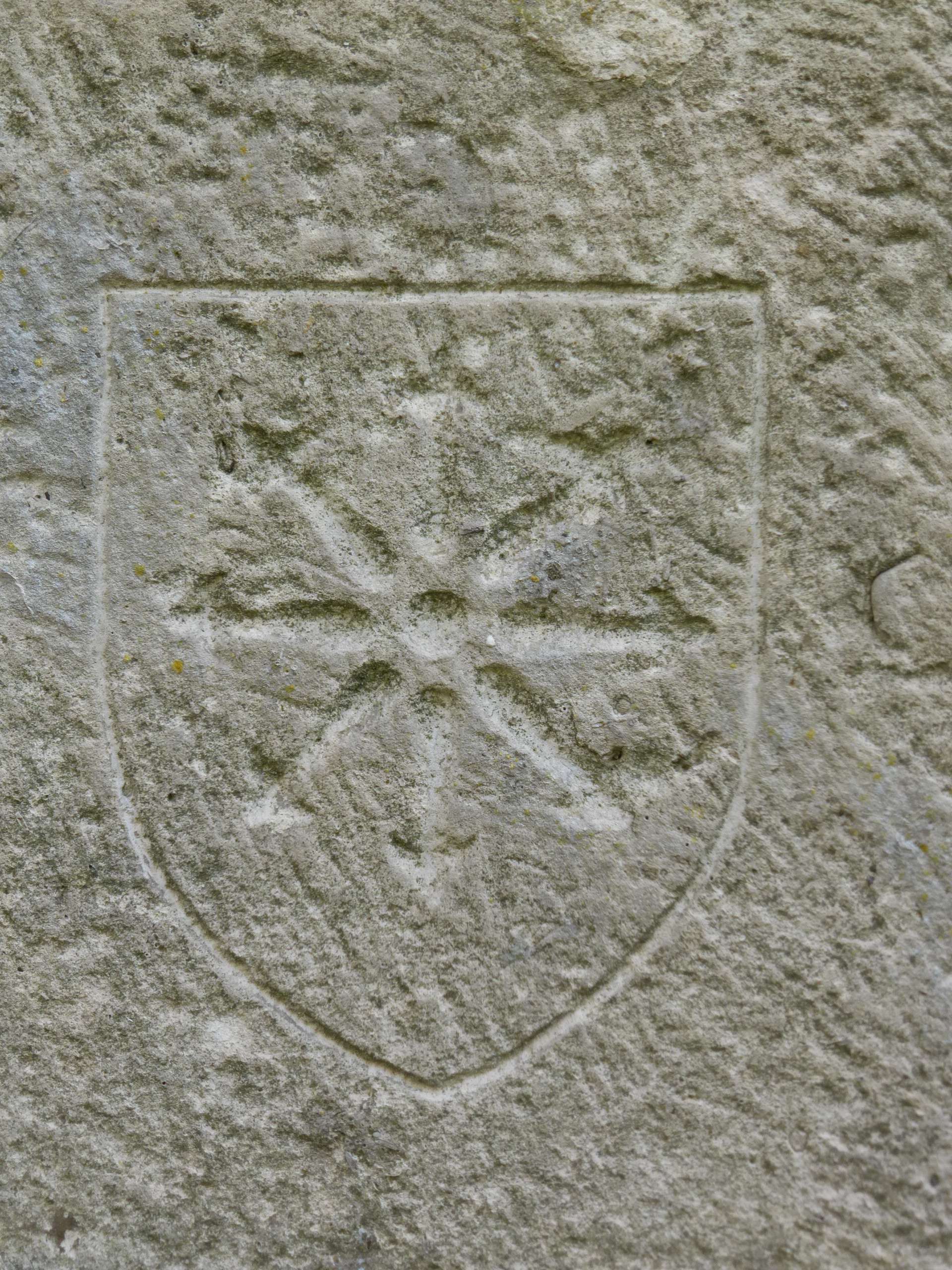 Rumantsch: Armoiries du Prieur de Cormicy (Marne-France)